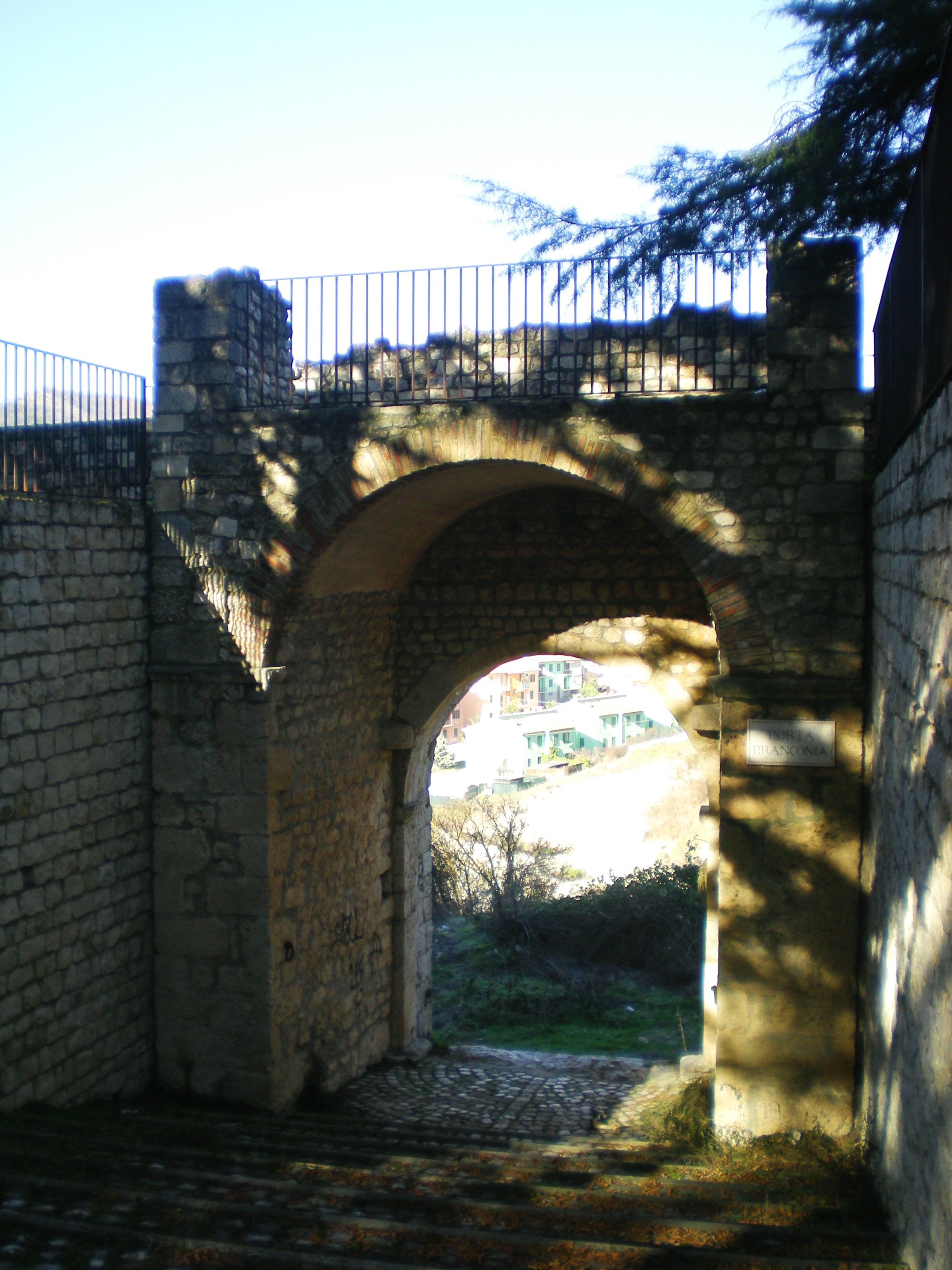 Porta Branconio (L'Aquila): vista interna dal viale Duca degli Abruzzi